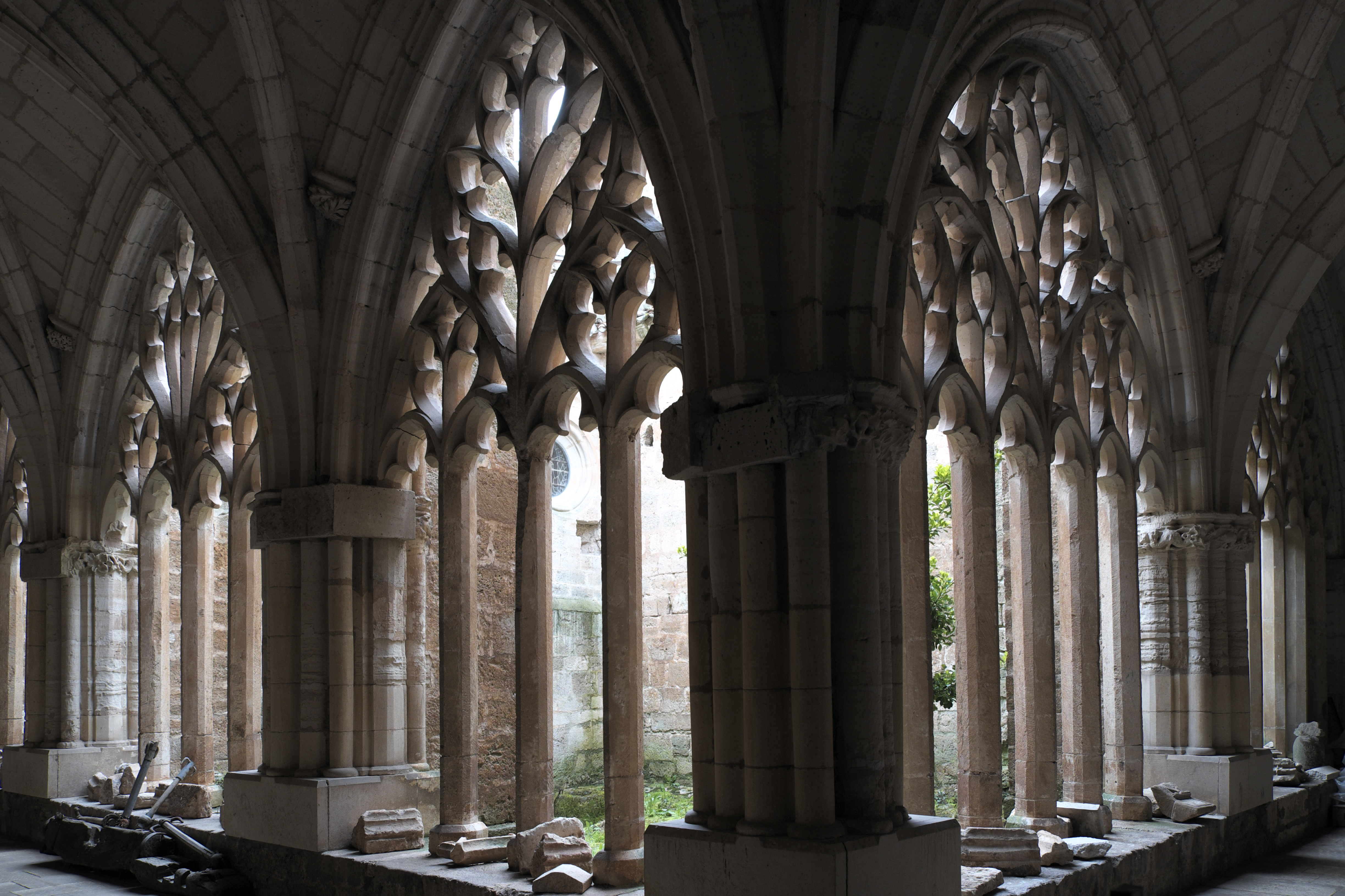 Kreuzgang der Kirche Asunción de Nuestra Señora (Mariä Himmelfahrt) in Santa María del Campo in der Provinz Burgos (Kastilien-León/Spanien)